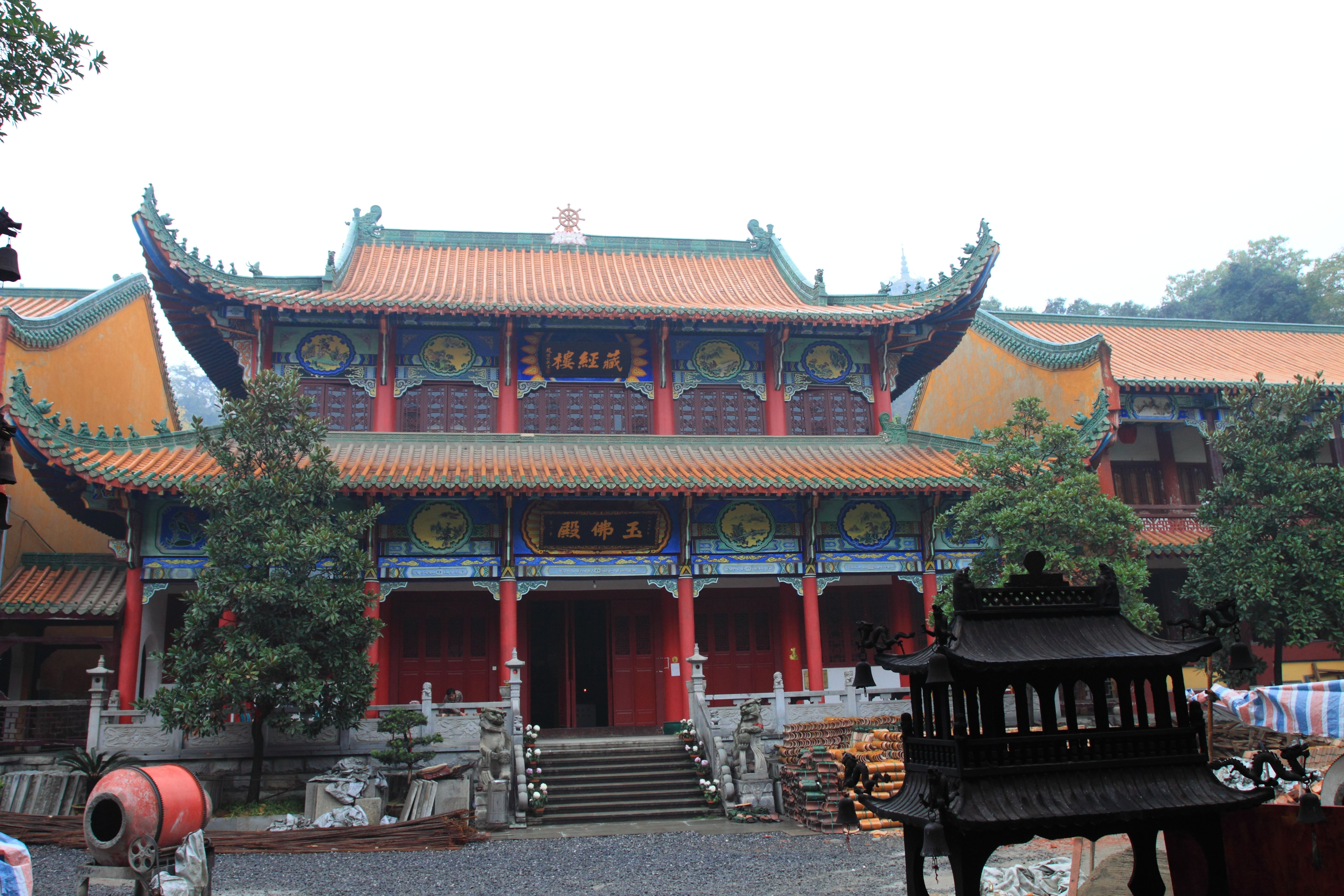 武汉市武昌区宝通寺 —— 藏经楼